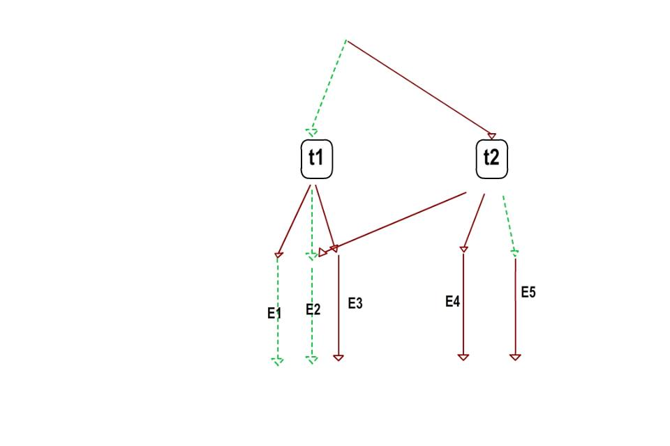 Paso 1.